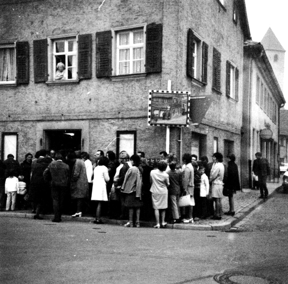 Kundenschlange vor der anderen Schuh-Schneider Filiale am Plan (heute Sparkasse)